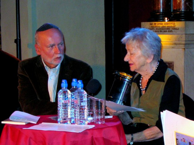 Wisława Szymborska, Polish poet, Nobel Prize in Literature 1996 with Adam Zagajewski, Polish poet